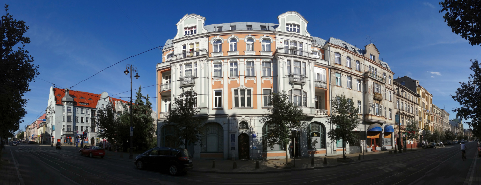 Ulica Gdańska w Bydgoszczy